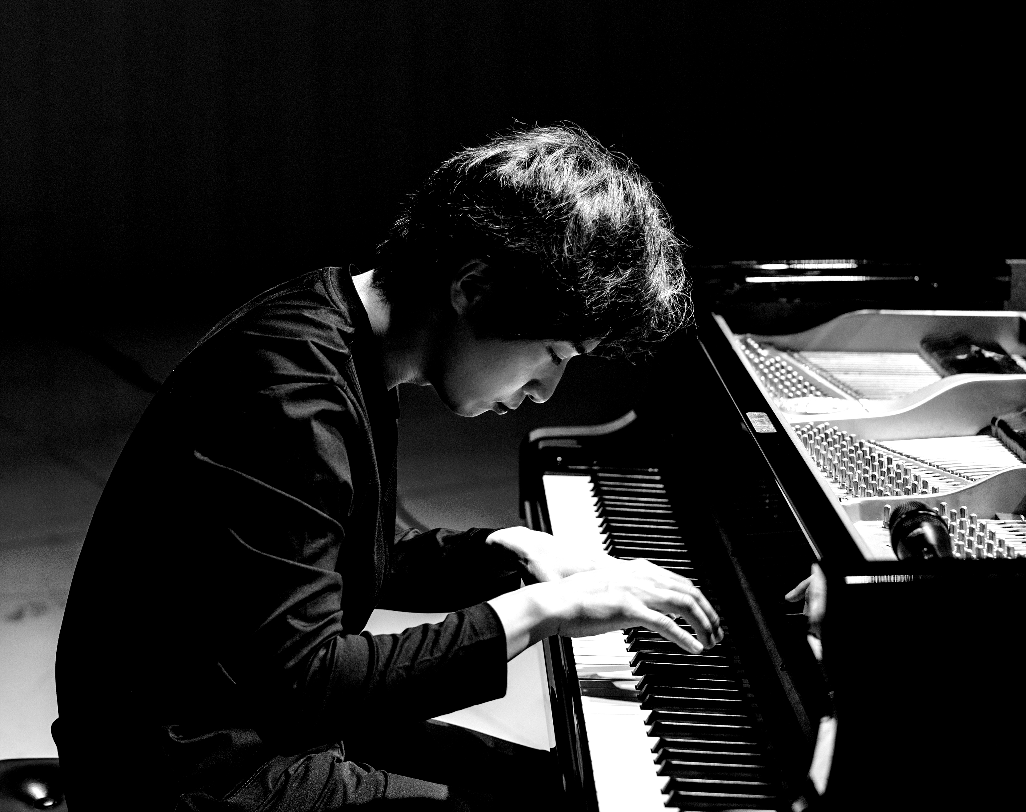 작곡가 / 피아니스트 민시후